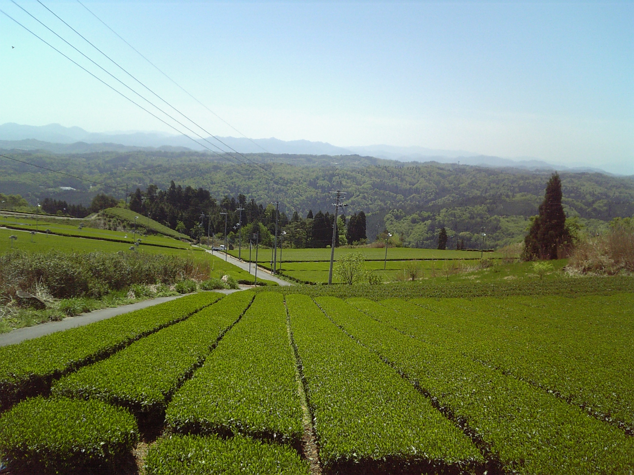 奈良県山辺郡山添村内の茶畑。山添村は大和茶の産地である